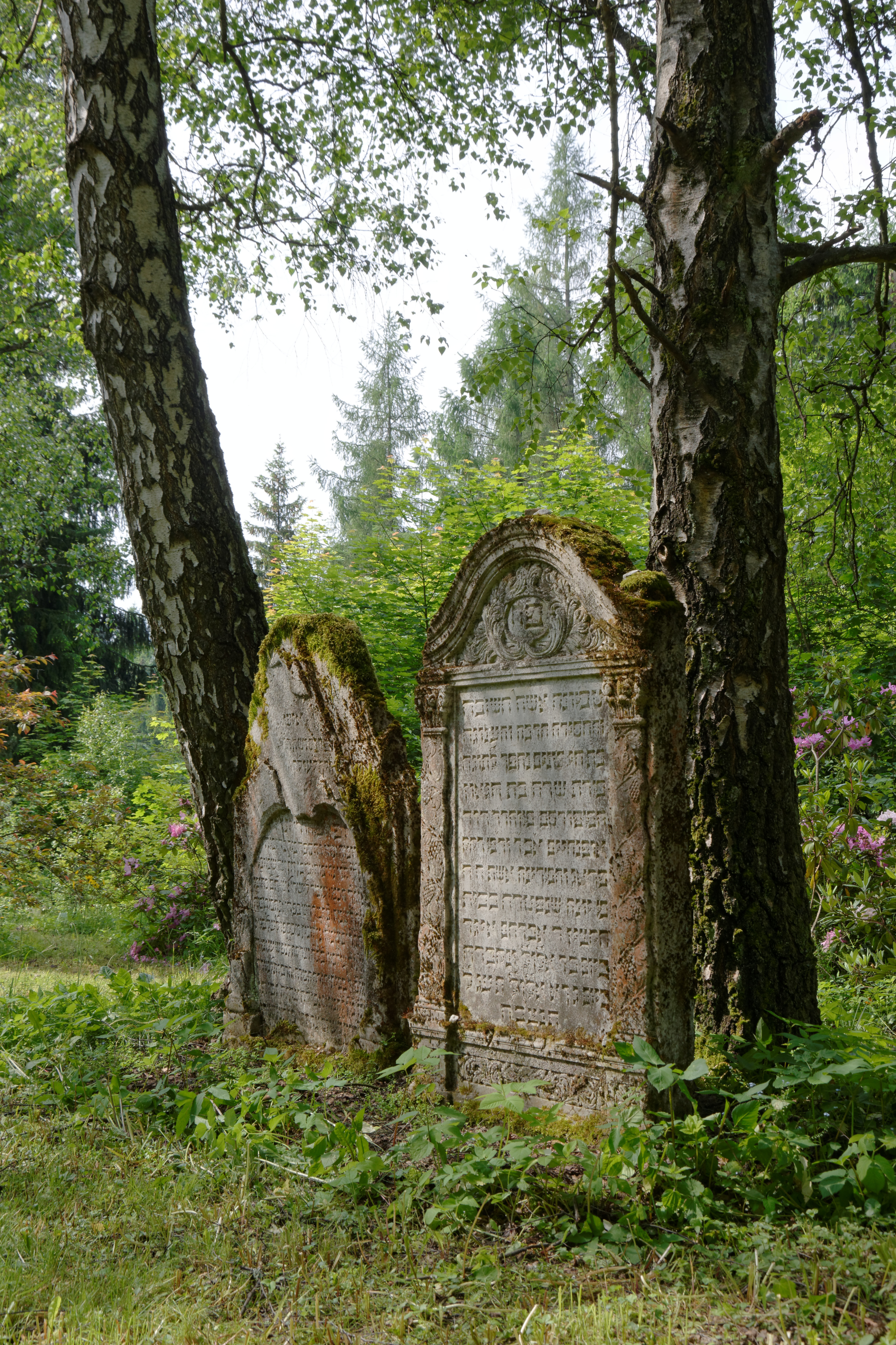 Židovský hřbitov v Mariánských lázních.